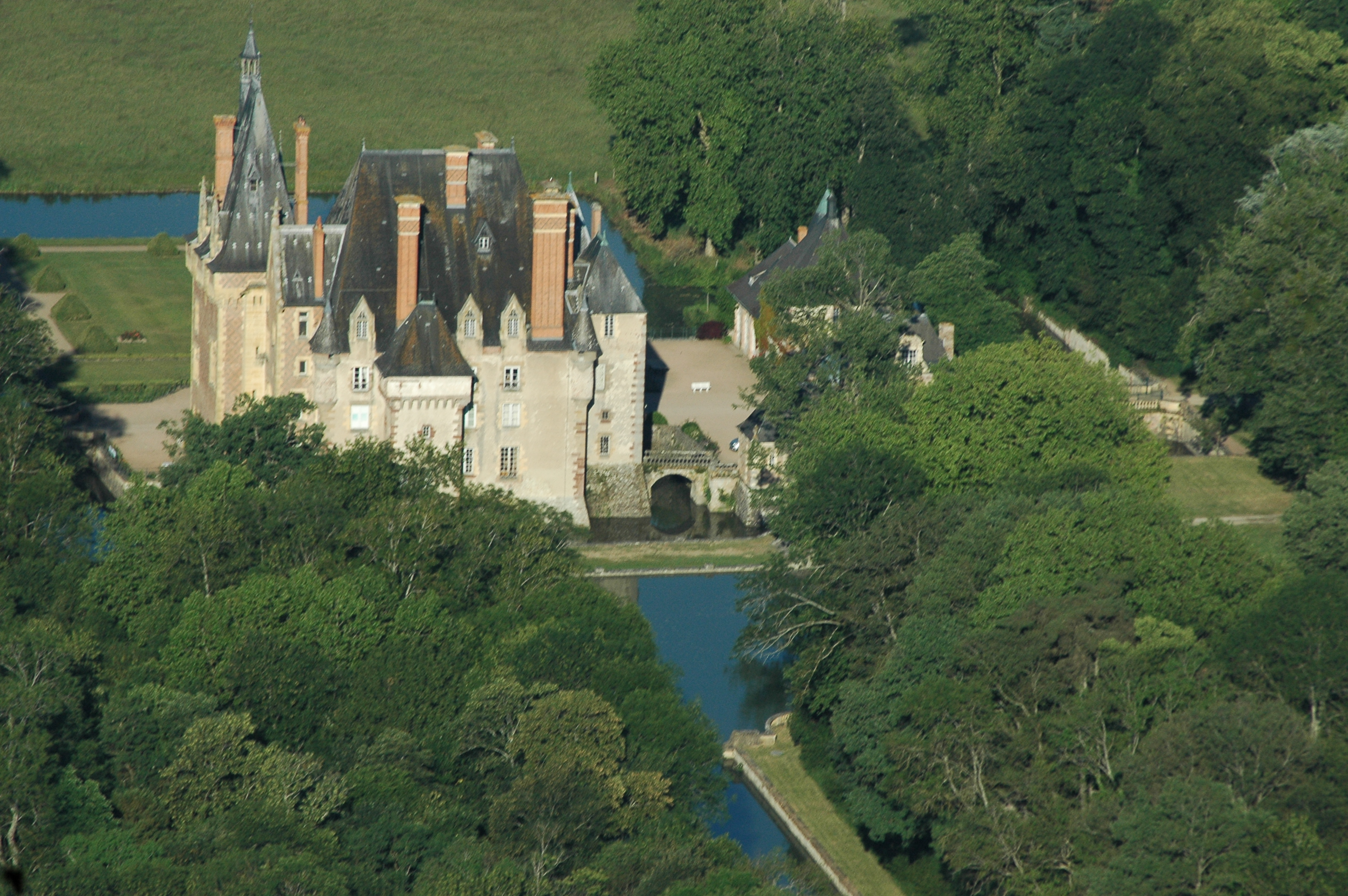 Le château d'Avrilly à Trévol, Allier, France.